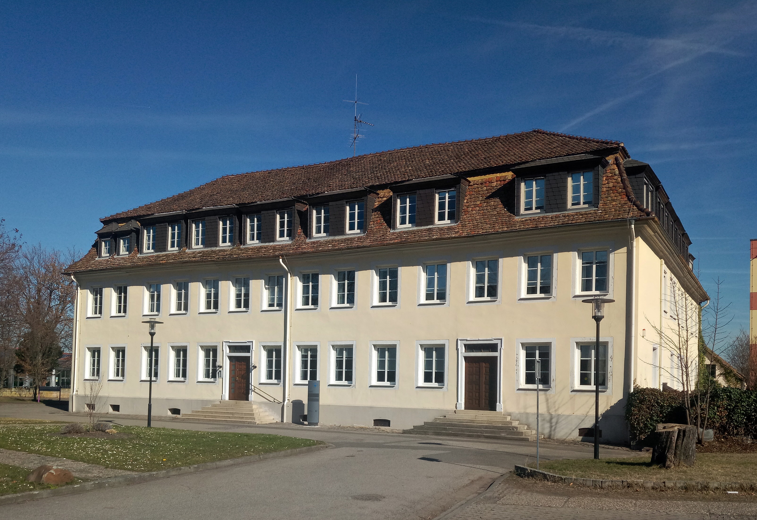 Bad Dürkheim, historisches Verwaltungsgebäude der Saline Philippshall (späteres Salzamt), heute Verwaltung des Ev. Krankenhauses